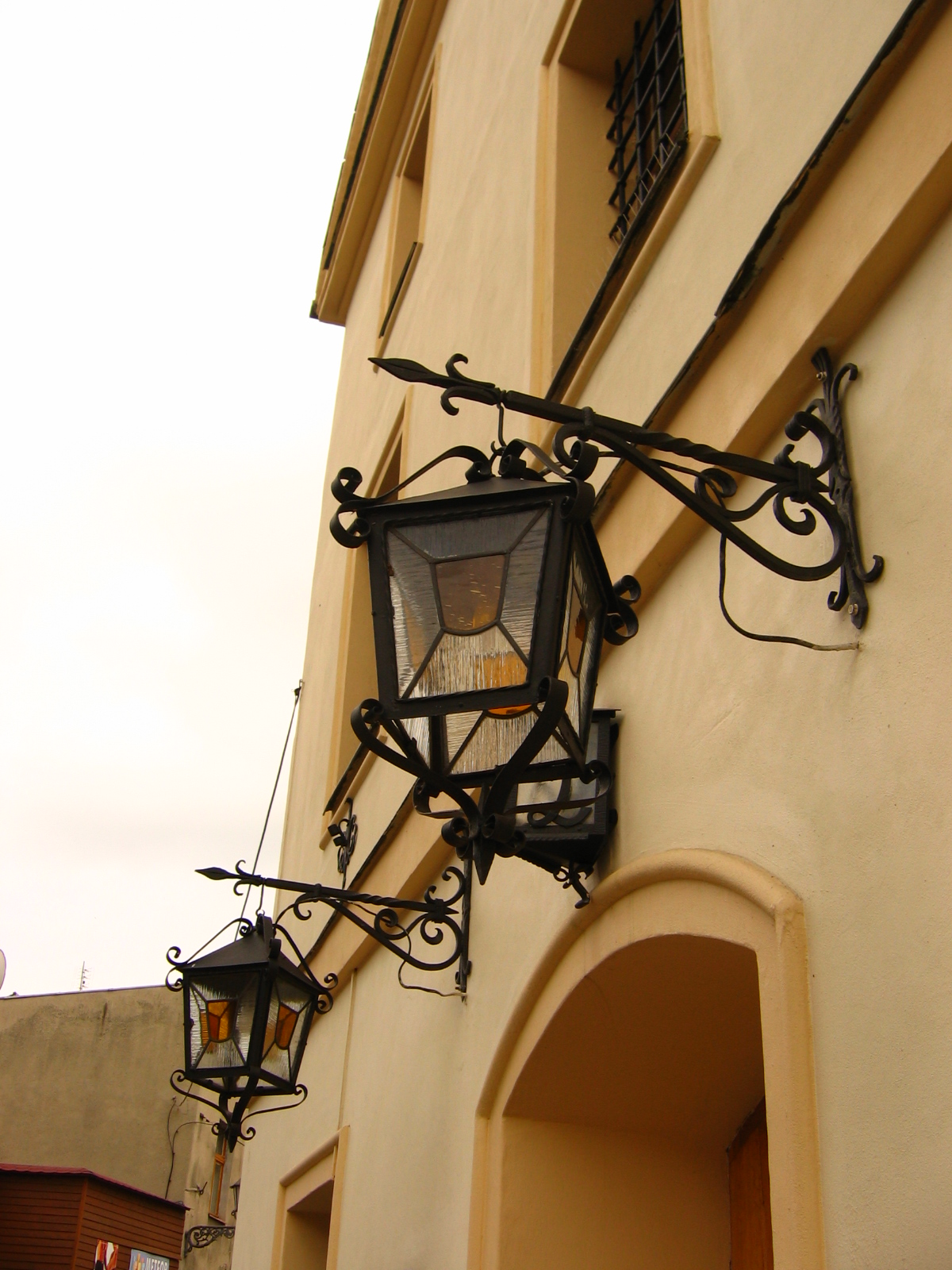 Willa Caro in Gliwice